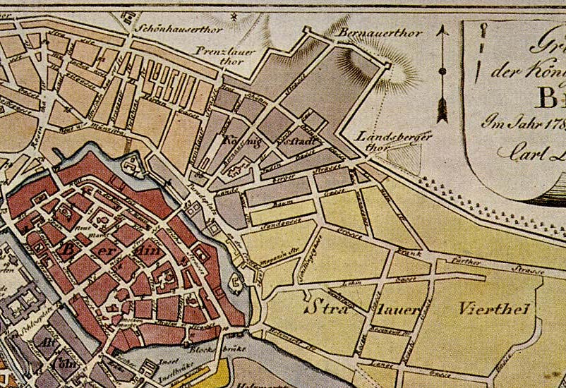 Ausschnitt aus einem Berlin-Plan von 1789 mit der Königsvorstadt